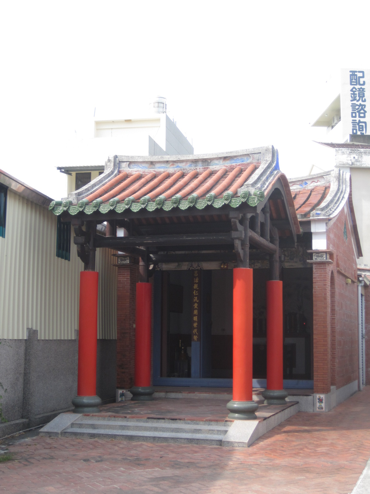 位在臺南市佳里北極玄天宮旁的蔡榮昌祠